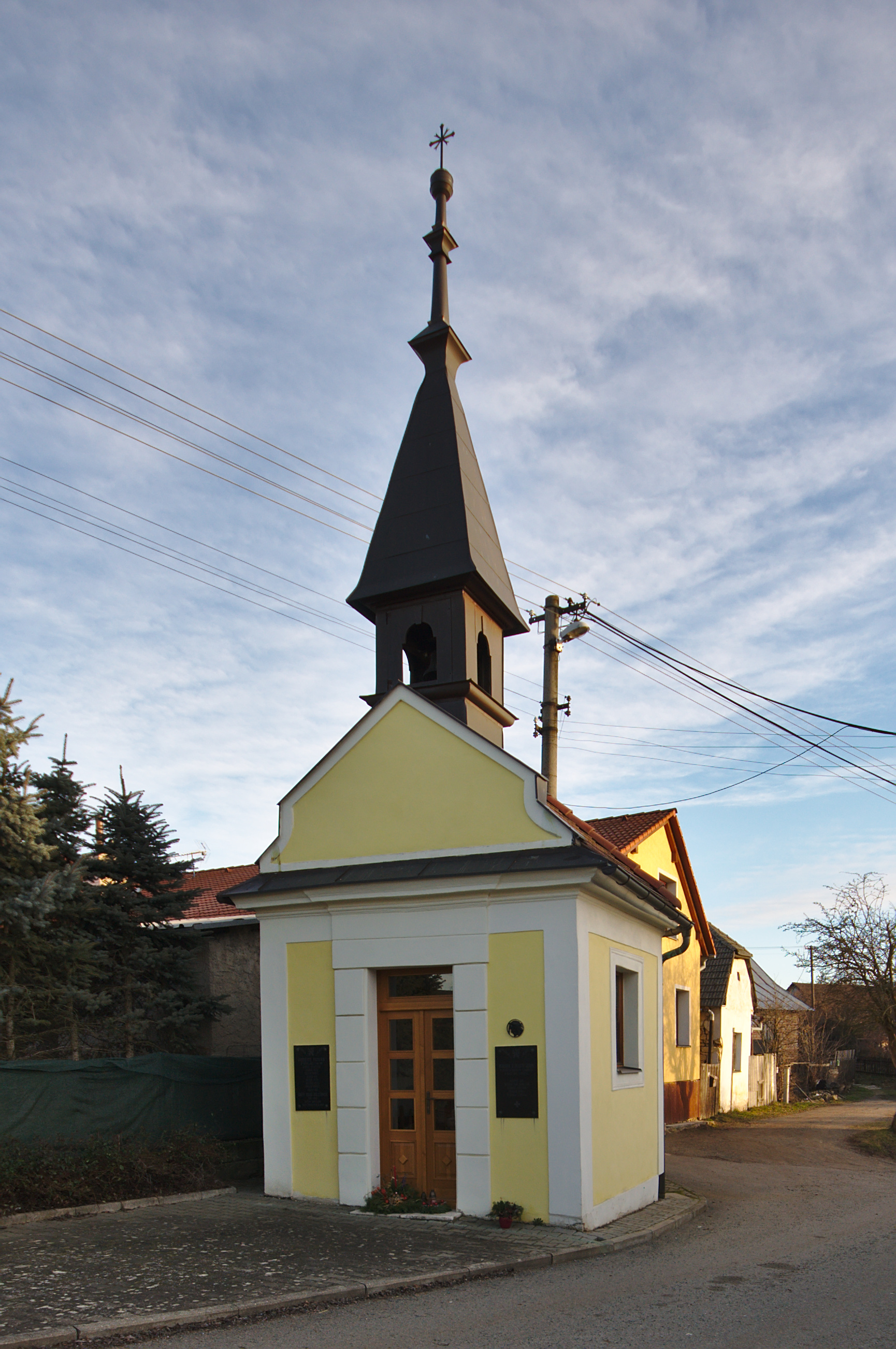 Kaple, Újezd, Kunštát, okres Blansko